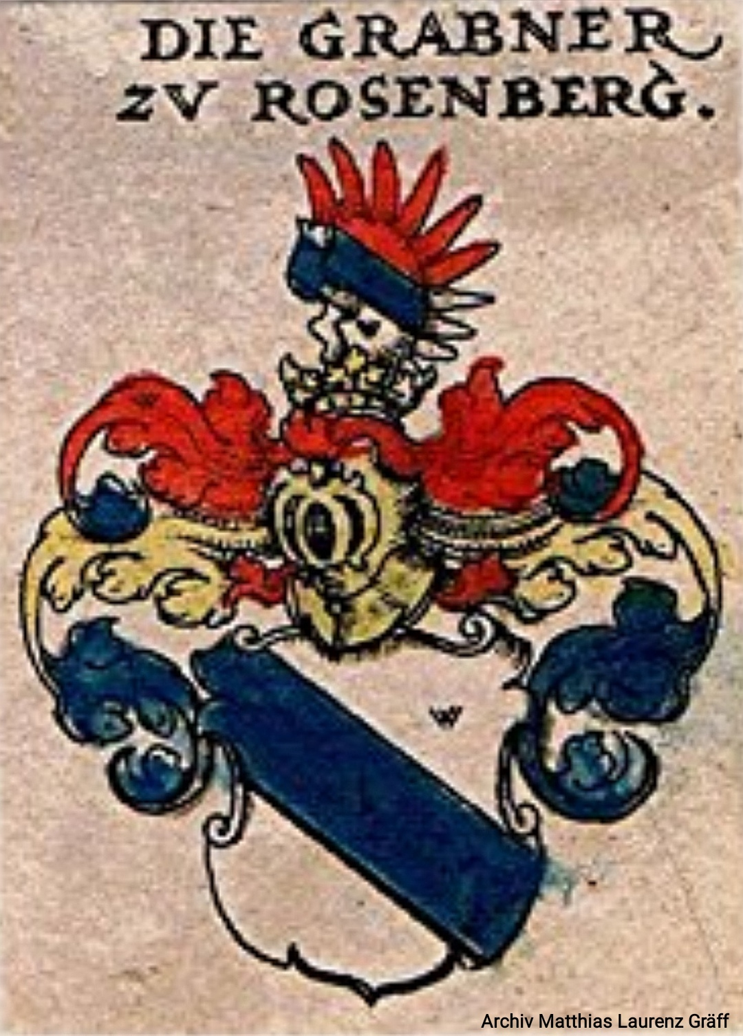 Wappen Grabner zu Rosenburg (Herren von Graben). Handkolorierter Druck